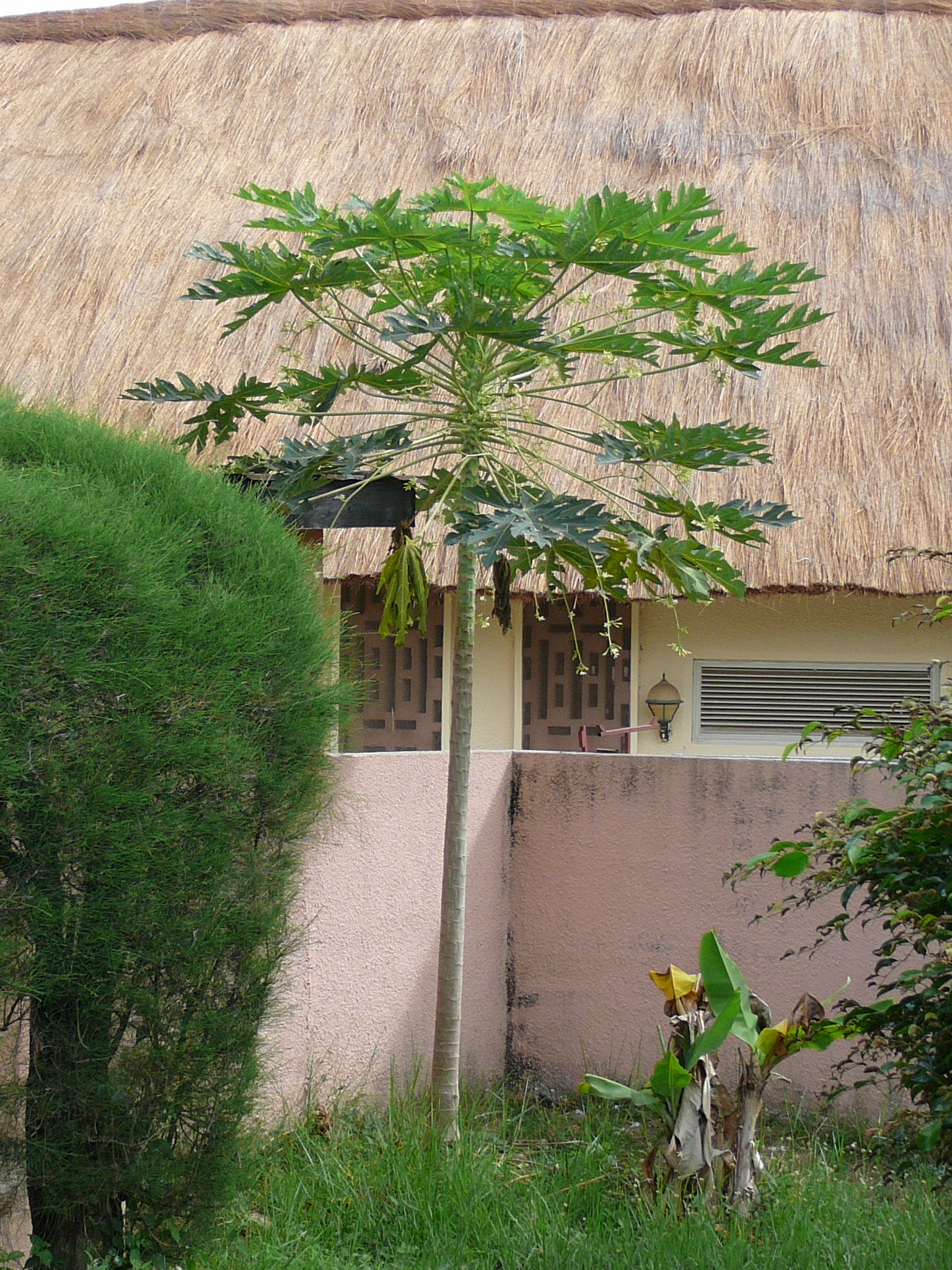 Carica papaya